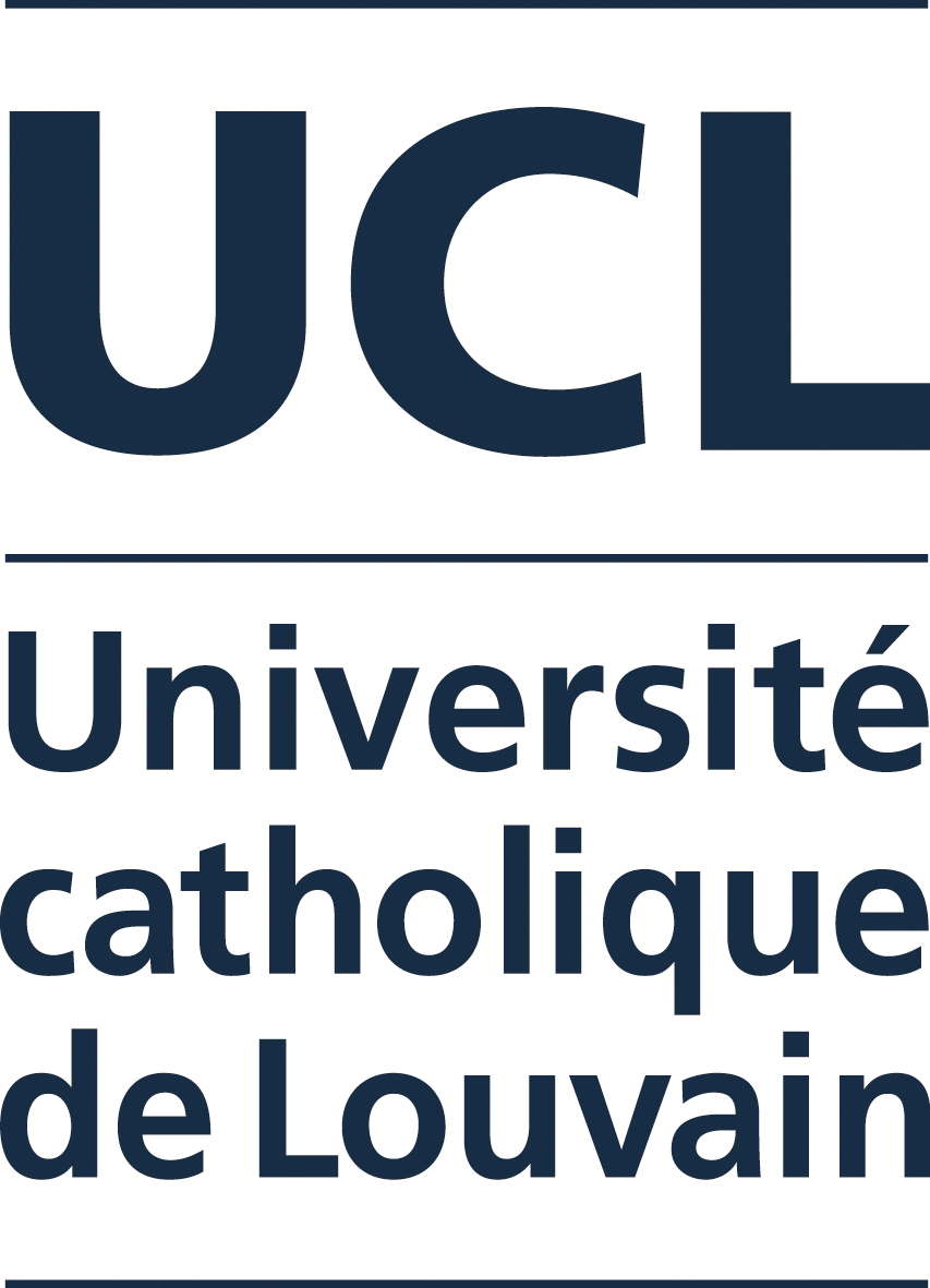 Ancien logo de l'Université catholique de Louvain (2015-2018)